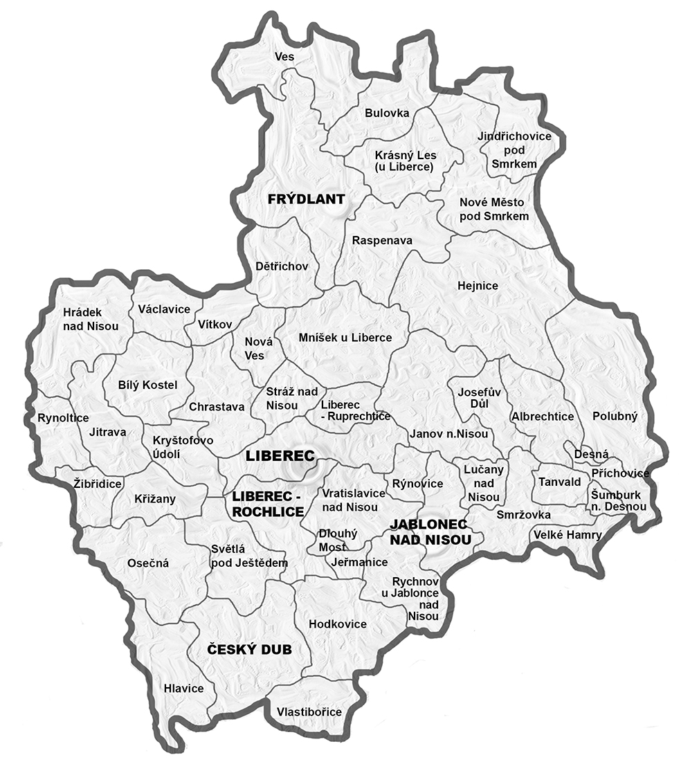 Diecéze litoměřická, liberecký vikariát - farnosti